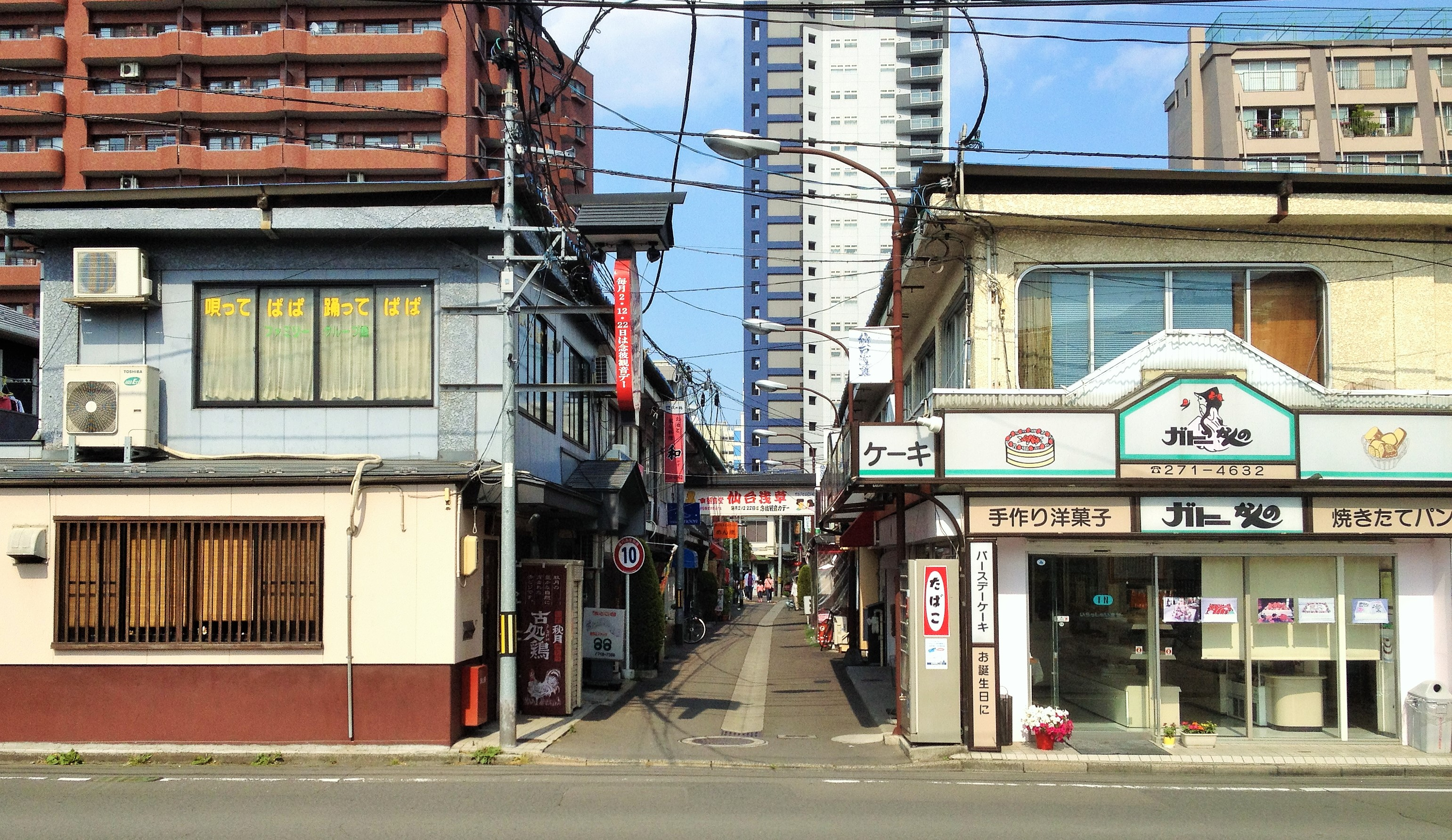 仙台浅草（通町側より）